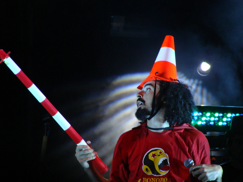 Italian singer Caparezza